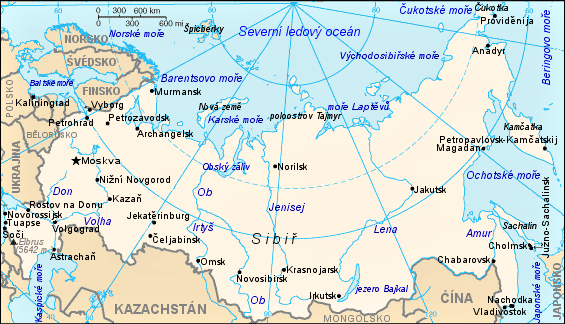 Orientační mapa Ruska.